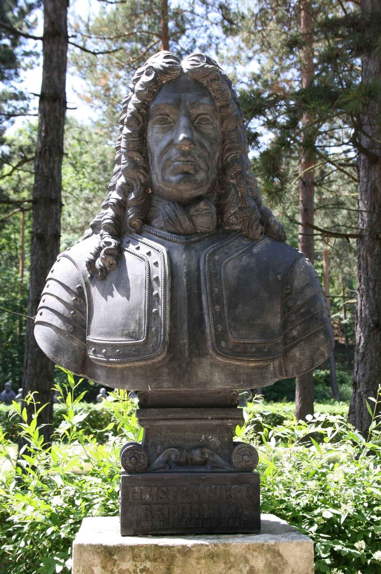 Büste in der Gedenkstätte Heldenberg (Niederösterreich)